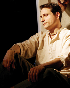 Al Conti Photo